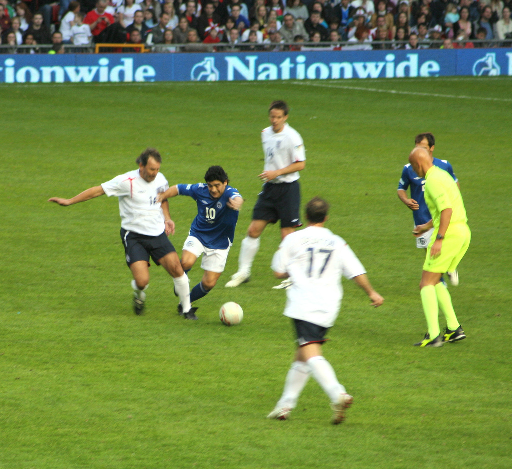 Diego Armando Maradona, en el partido de caridad Soccer Aid entre leyendas futbolísticas. El partido se disputó el 27 de mayo de 2006 entre estrellas de Inglaterra contra estrellas del Resto del Mundo.